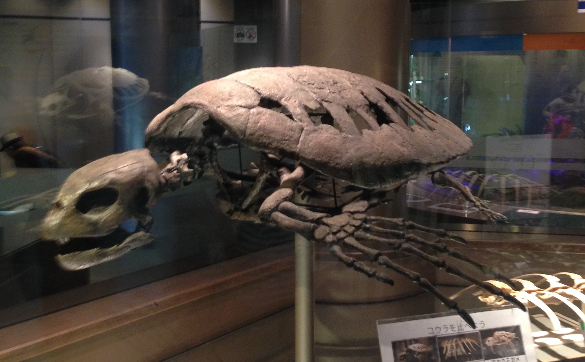 むかわ町穂別博物館に展示されているメソダーモケリスの復元模型